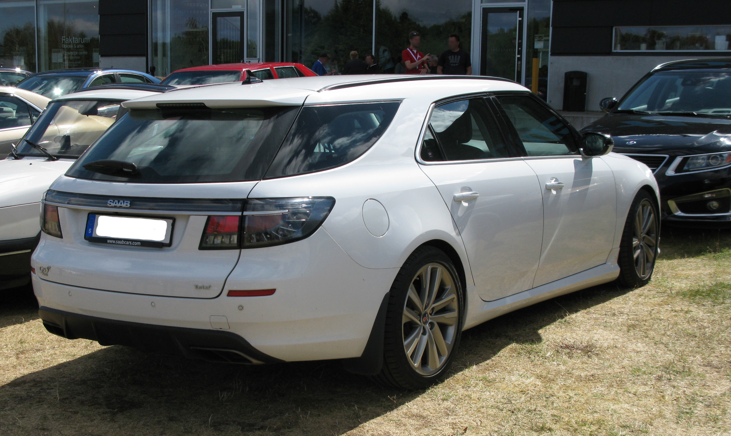 International Saab Meeting 2016.